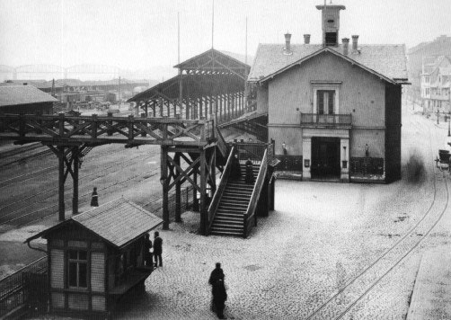 Fotografie des ehemaligen Bahnhofes in der Rheinstraße in Mainz vor 1884.